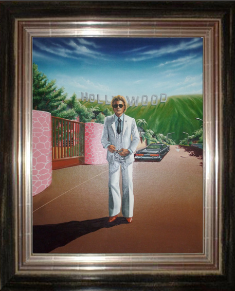 Illustration créée pour faire la couverture de l'album Hollywood de Johnny Halliday